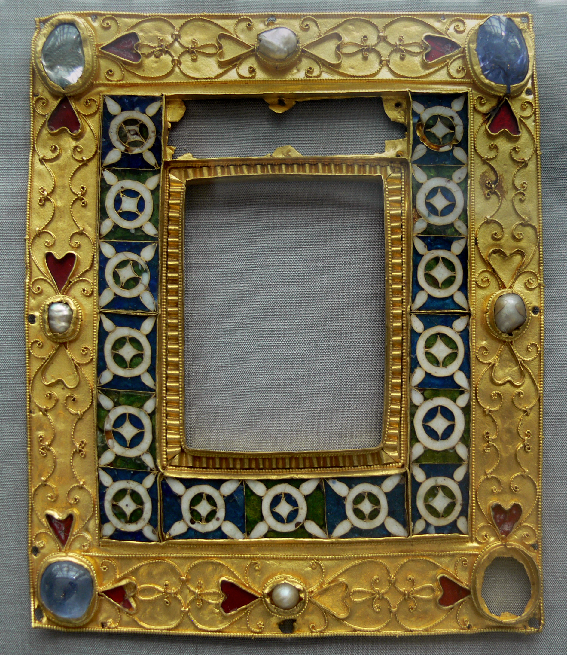 Der sogenannte Berliner Rahmen. Rahmen; Gold, Filigran, Zellenschmelz, Steinschmuck, Perlen; Trier um 977-983 Kunstgewerbemuseum Berlin, aus der Sammlung Peter Beuth; Inv. Nr. O-1967,24